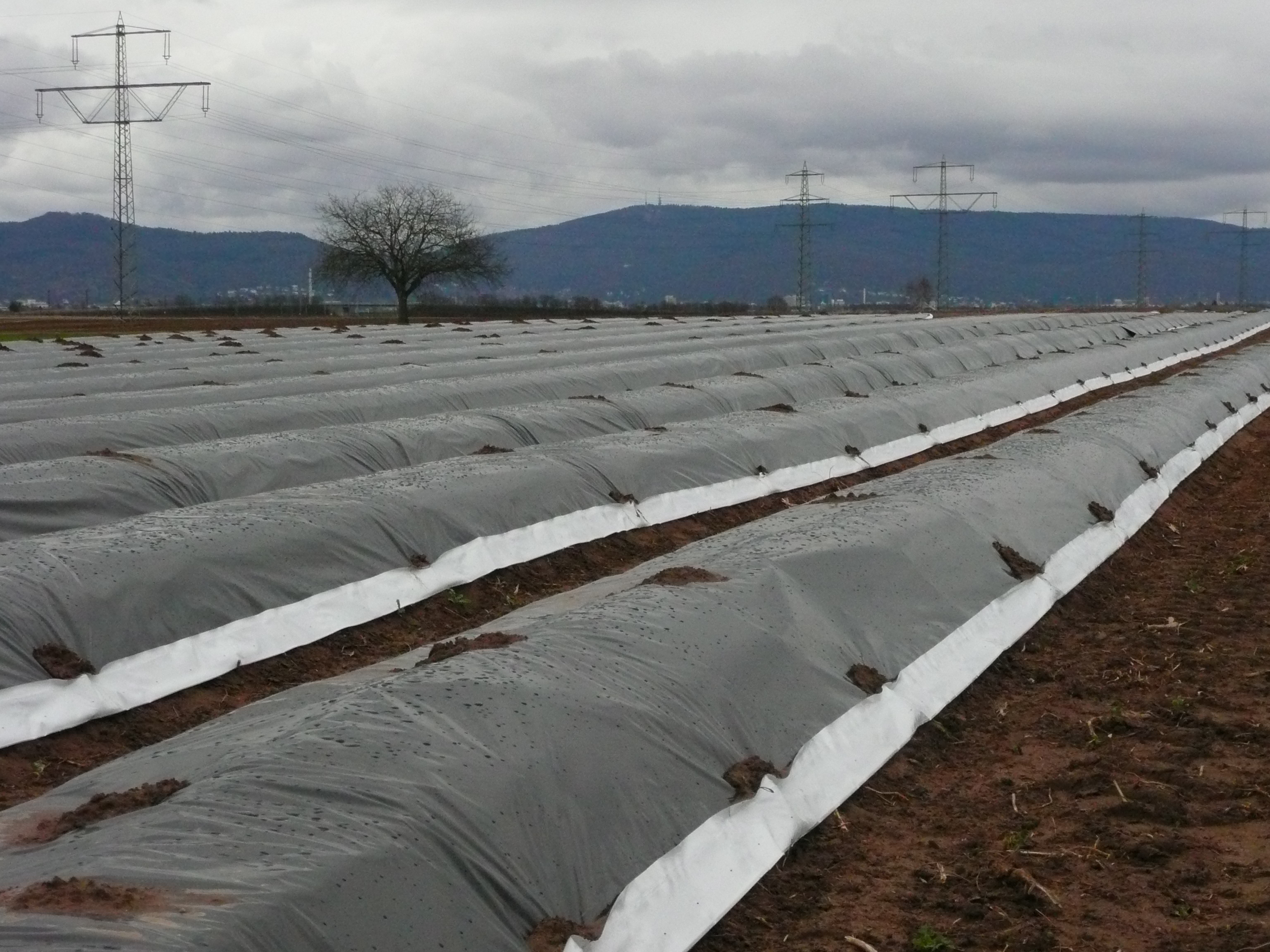 Spargelanbau in Heidelberg (Baden-Württemberg, Deutschland)